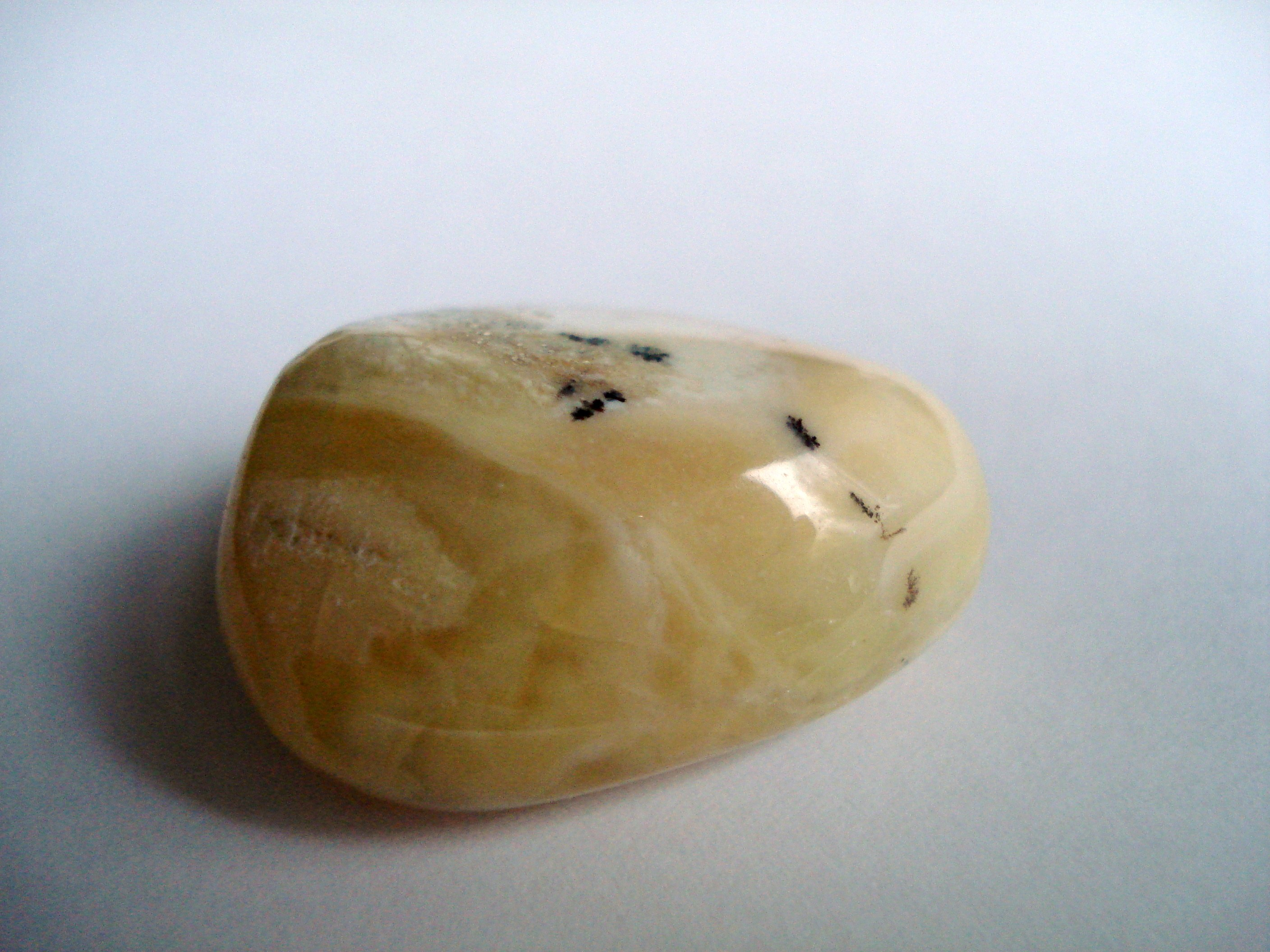 Fotografie Zluteho Opalu